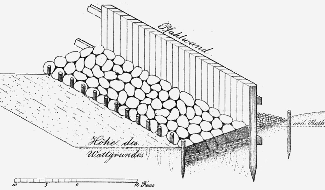 Aufriss der Konstruktion der Pfahlwand am Südwestdeich der Insel Neuwerk